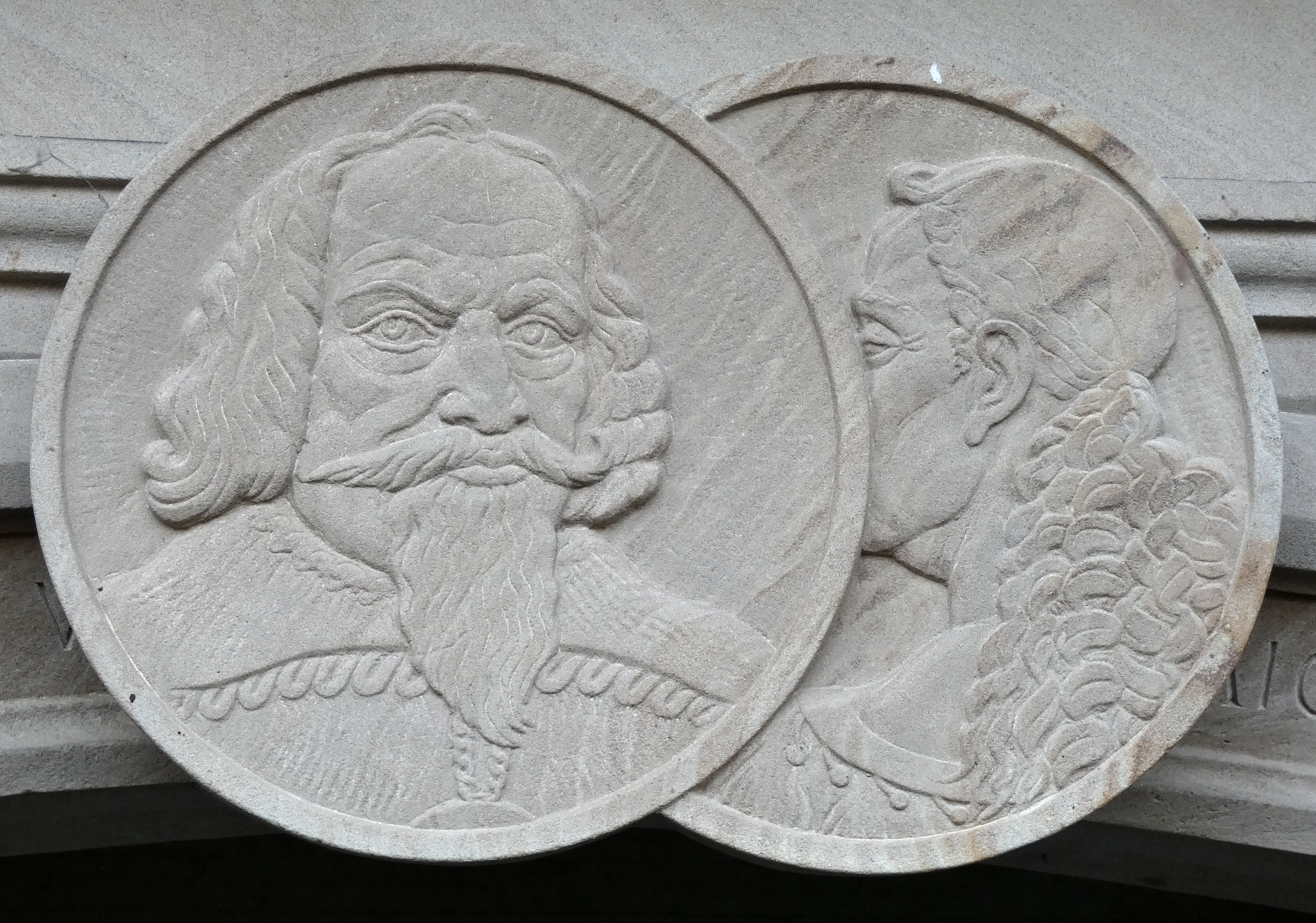 Stadtgottesacker Halle, Bogen 65, Grabstätte von Bruno Stisser, Wappenschild mit Reliefporträt von Bruno Stisser und seiner Frau, Bildhauer: Martin Roedel, 2014